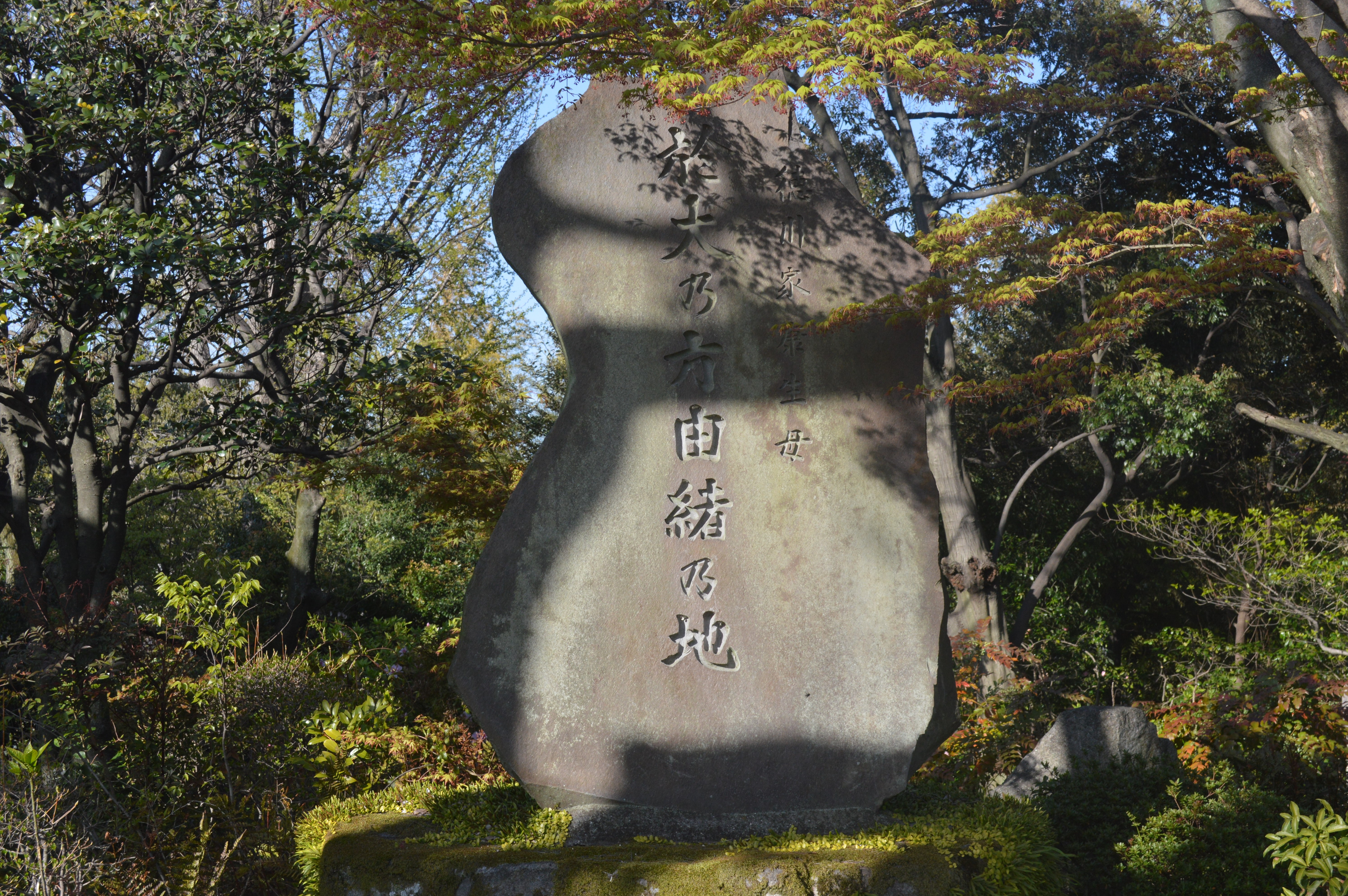 愛知県刈谷市銀座6丁目58-1にある椎の木屋敷跡。